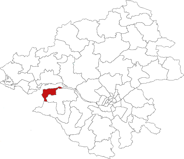 Carte de localisation du canton de Paimboeuf (France, Loire-Atlantique)